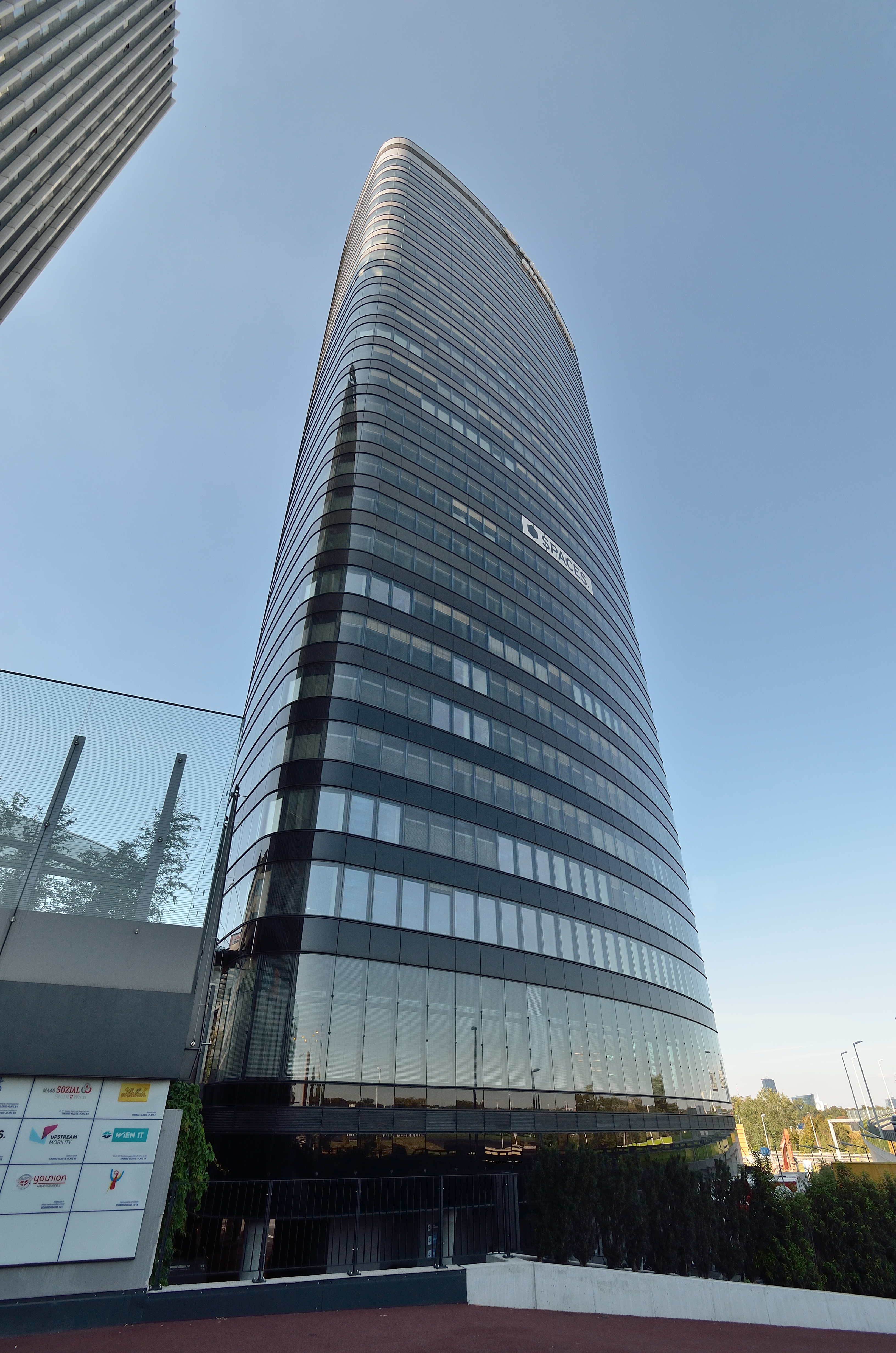 Orbi Tower, ein Bürohochhaus im Cluster TownTown in Wien-Landstraße.